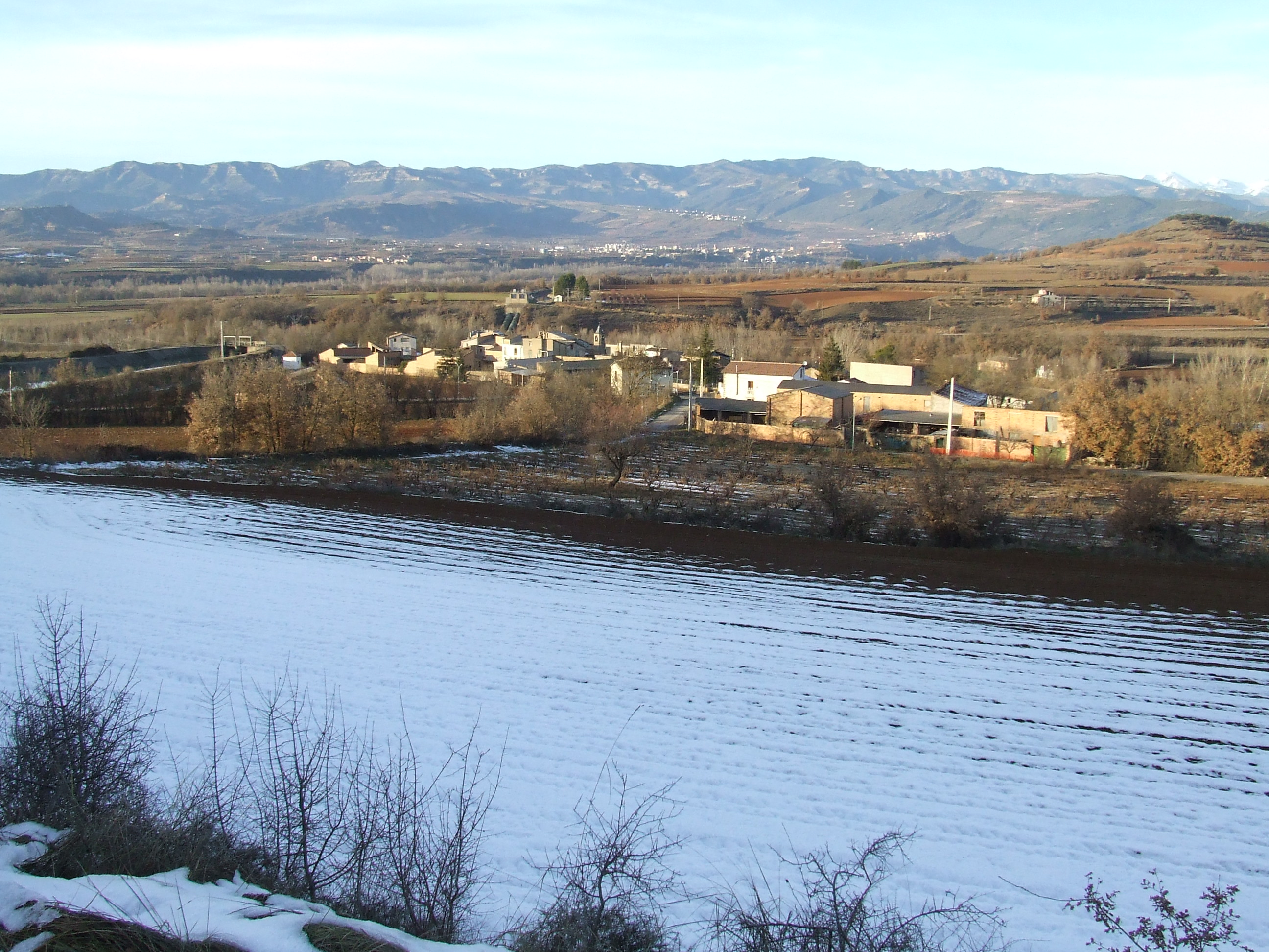 El poble de Gavet (Sant Serni, Gavet de la Conca, Pallars Jussà)